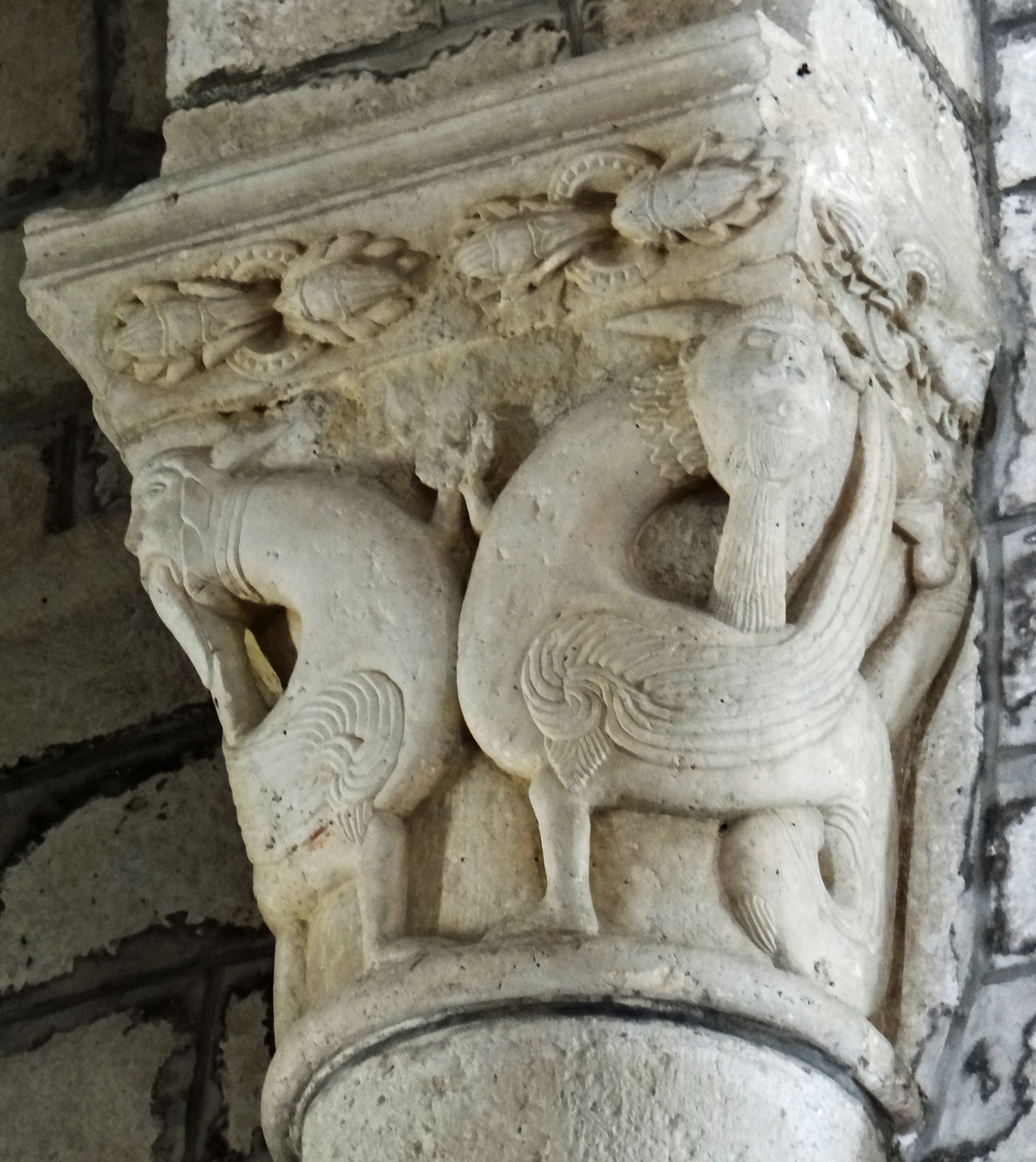 La Sauvetat-de-Savères - Église Saint-Pierre - Chapiteau d'une chapelle latérale